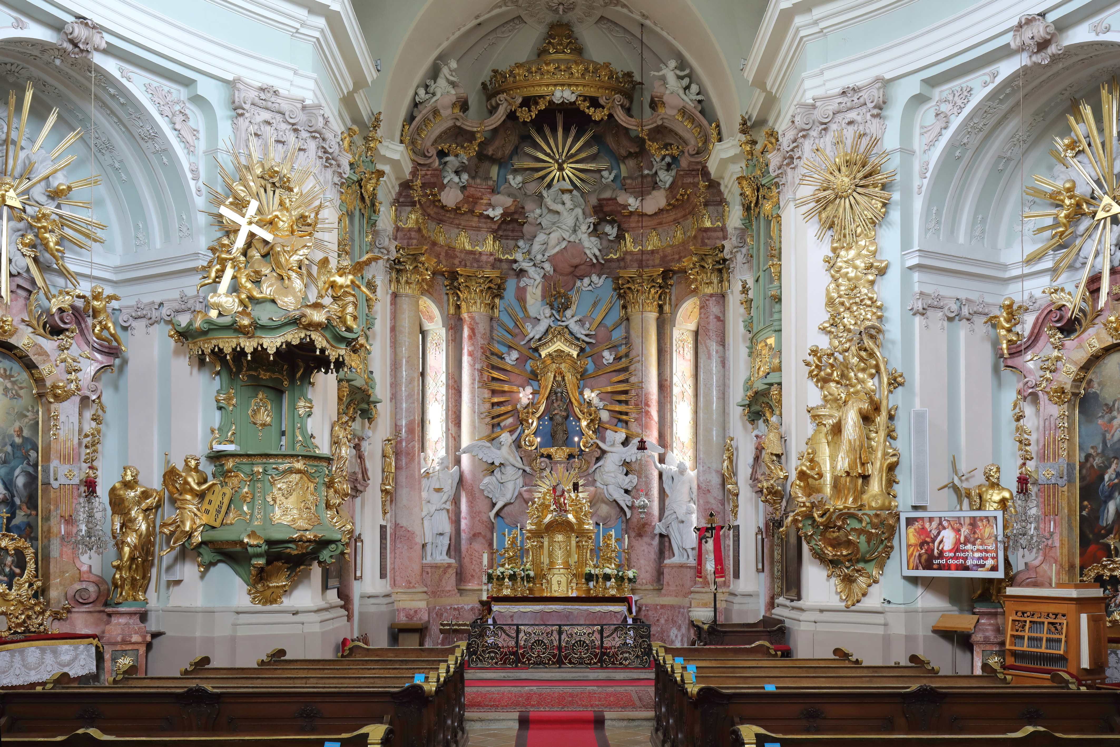 Innenansicht der Pfarr- und Wallfahrtskirche Unsere liebe Frau am Hafnerberg in der niederösterreichischen Marktgemeinde Altenmarkt an der Triesting. Der barocke Zentralbau wurde an Stelle einer Kapelle nach Plänen von Daniel Dietrich von 1729 bis 1740 errichtet. Der Hochaltar wurde von Balthasar Ferdinand Moll entworfen. Ausgeführt wurde er von Johann Joseph Resler und/oder von seinem Bruder Johann Georg Resler (1743/44). Vermutlich schuf Resler auch die Hängekanzel (1745).